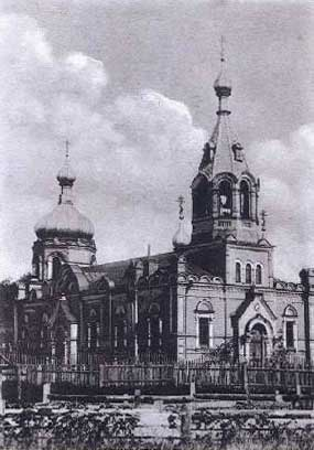 Cerkiew wojskowa Sobór Kazański przy ul. Traugutta w Białymstoku